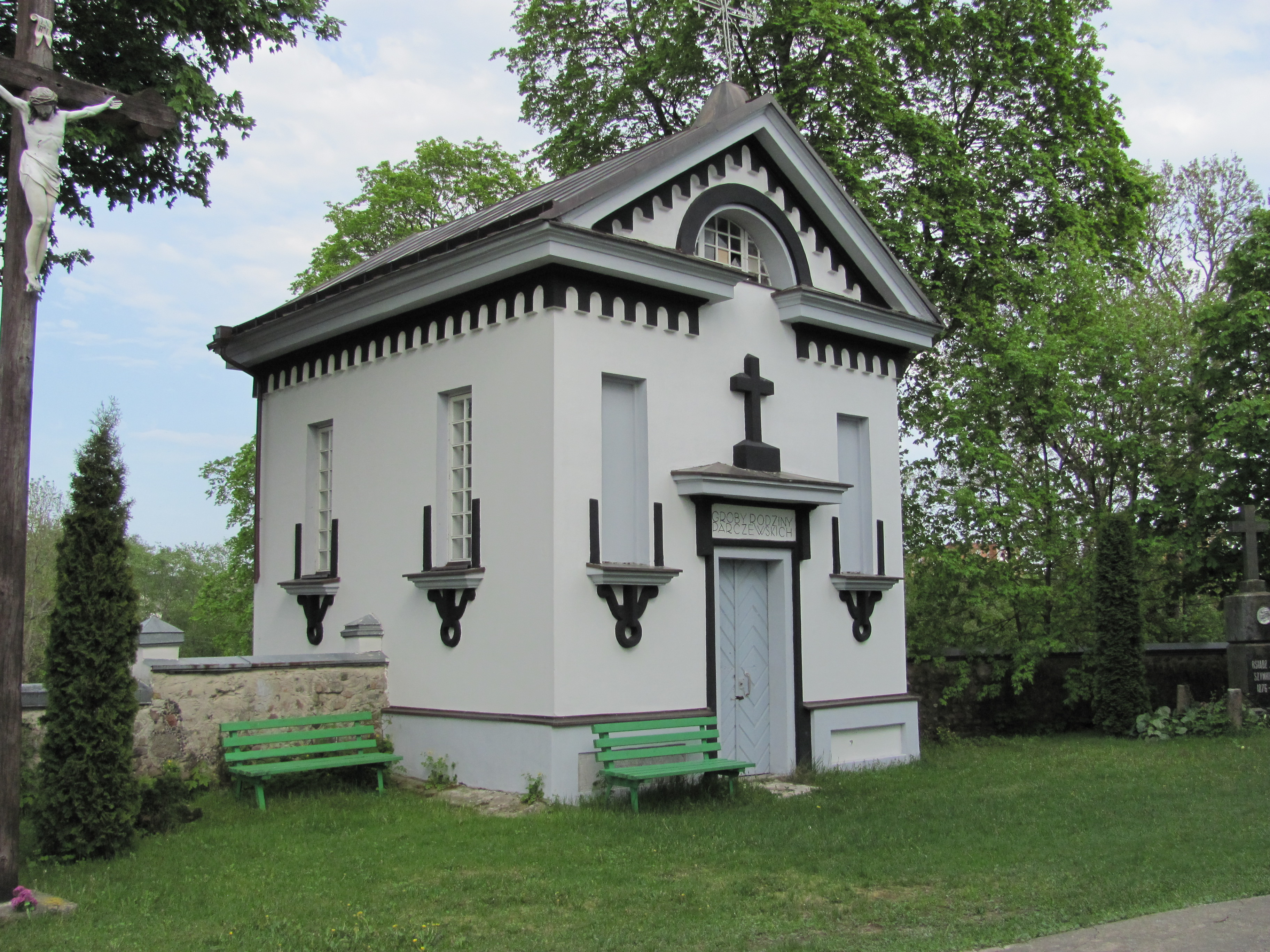 Nemenčinė, Lithuania